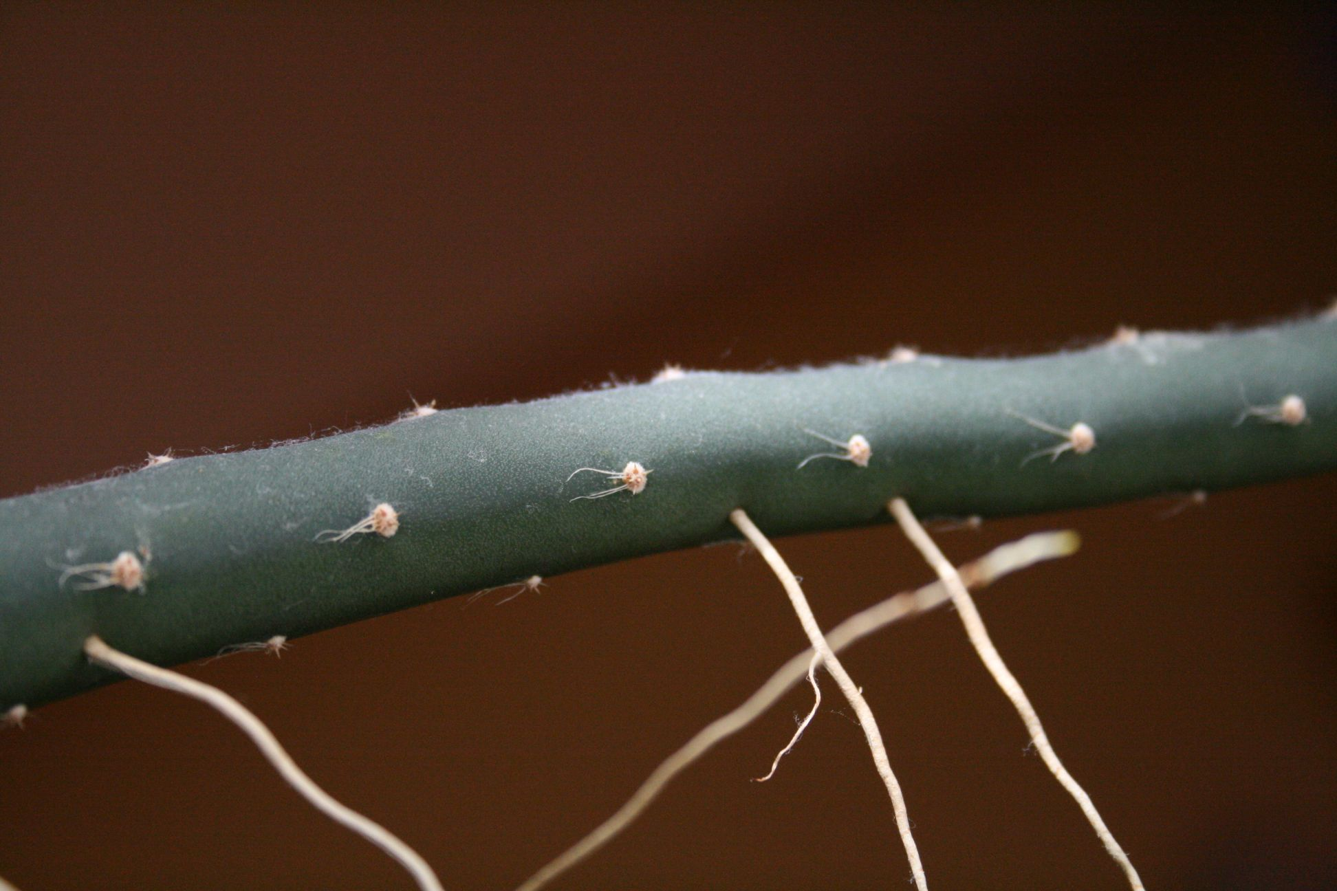 Selenicereus pteranthus (Hylocereeae; Cactaceae; Planta) hajtása